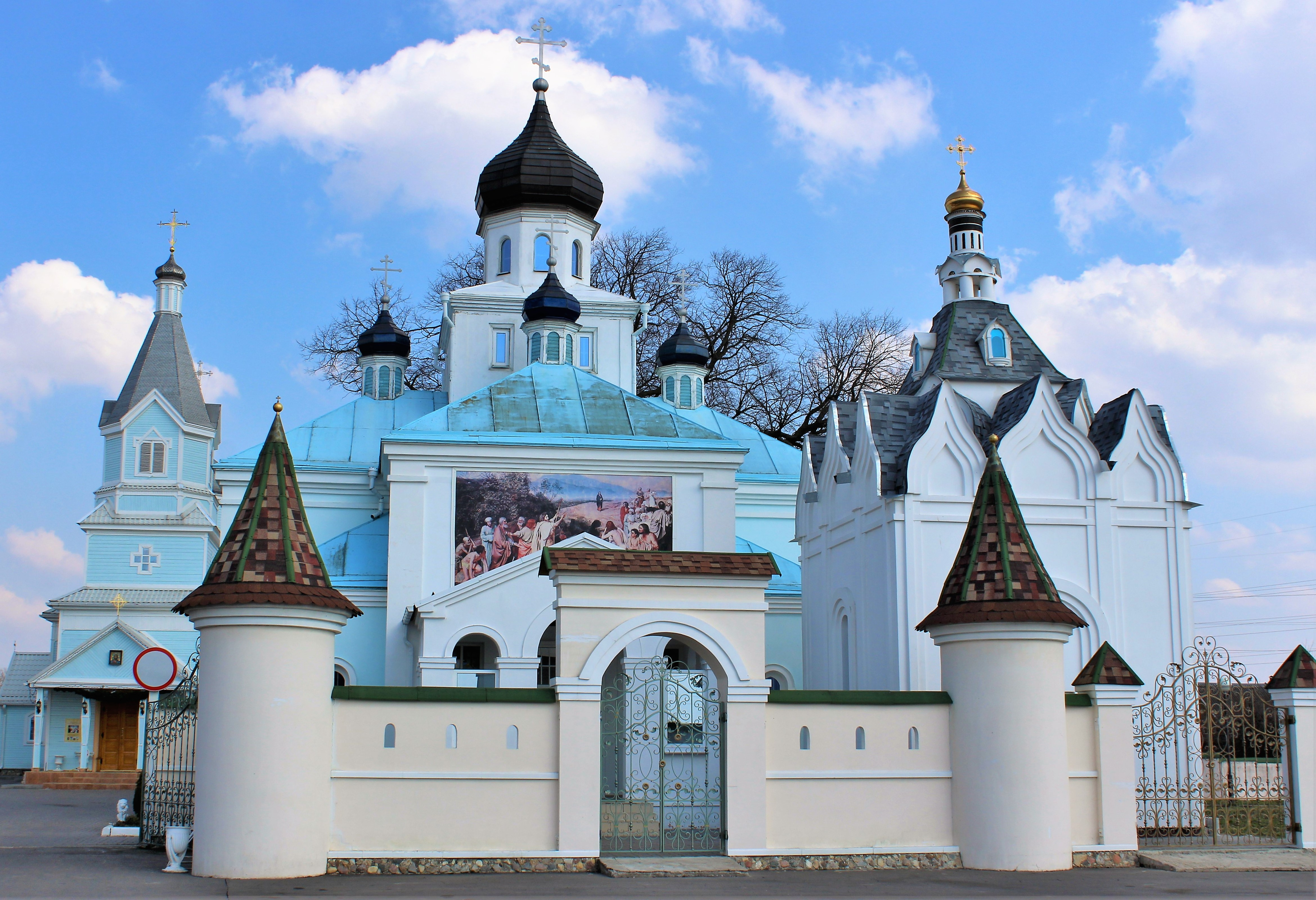 Православная Свято-покровская церковь